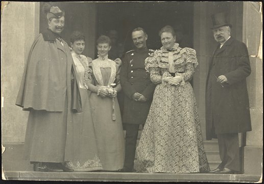 Wilhelm II en familieleden bij Schloß Moritzburg in Sachsen